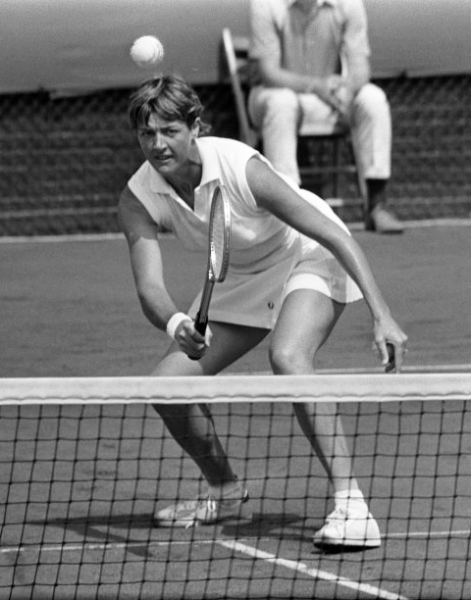 Internationaal tennistoernooi in Hilversum ( t Melkhuisje Margaret Court in aktie